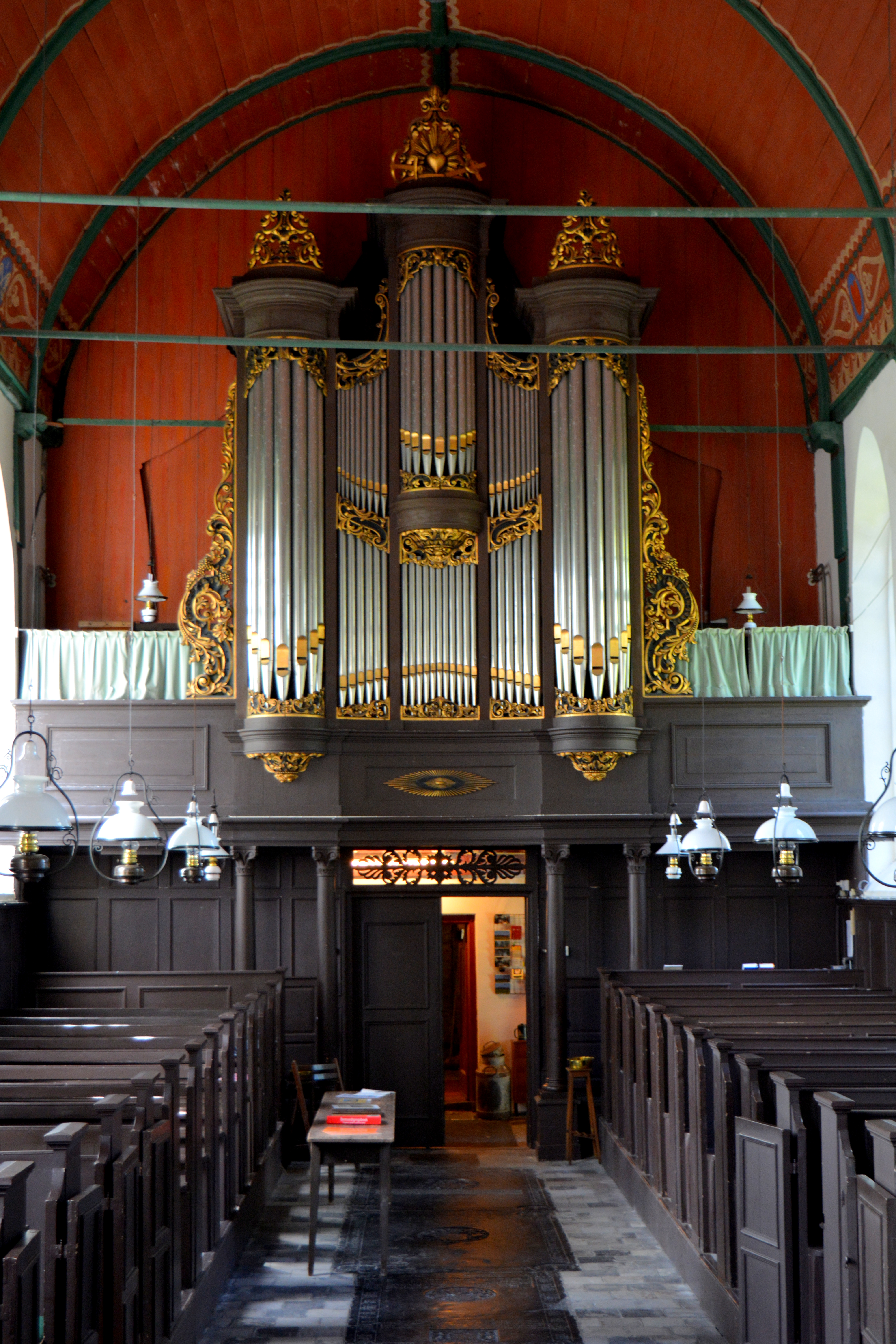 Gertrudiskerk, Lytsewierrum, orgel